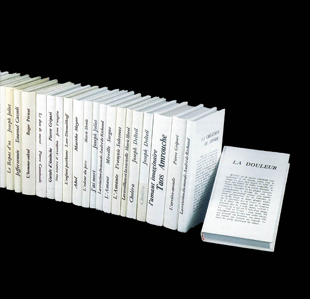 Collection Blanche - Robert Morel Éditeur